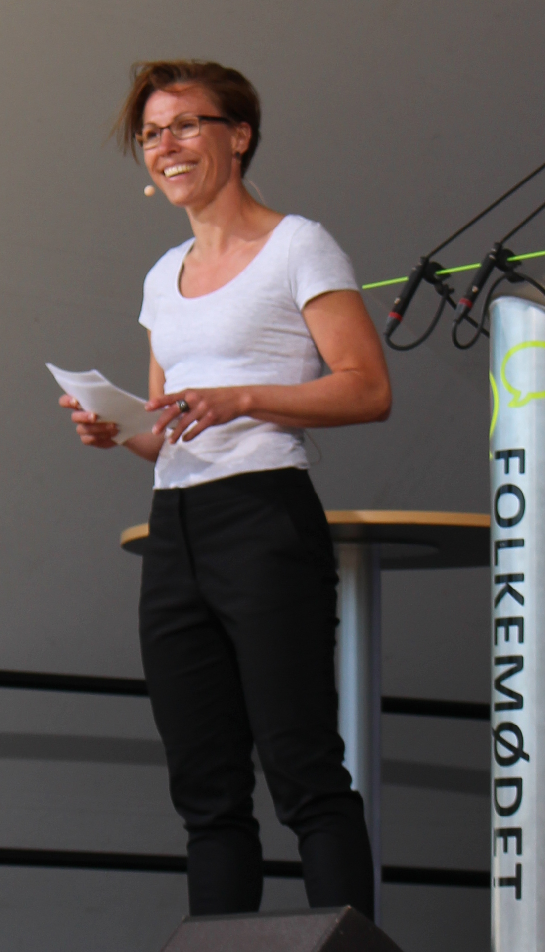 Winni Grosbøll på hovedscenen til afslutningen på Folkemødet 2016